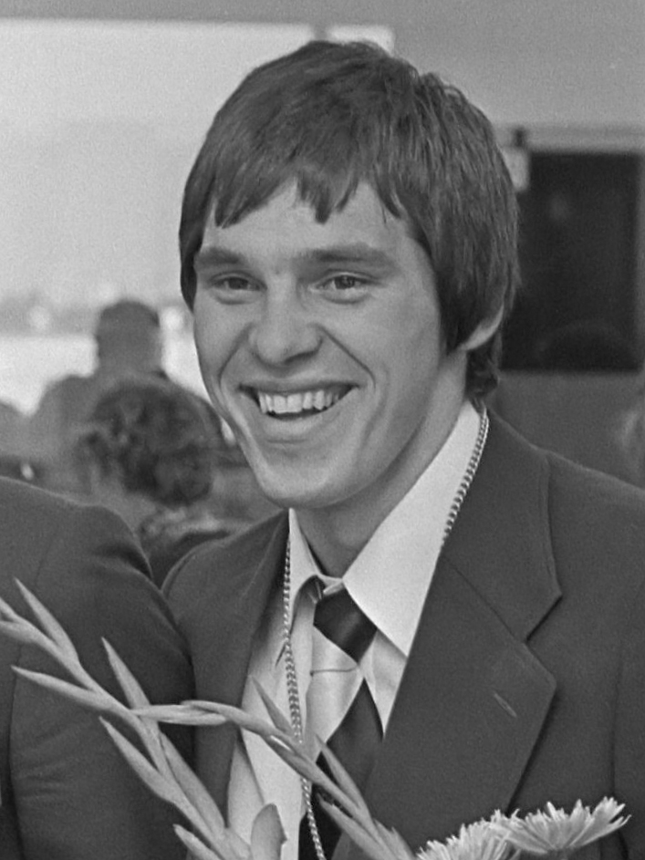 Deel waterpoloploeg terug uit Montreal, v.l.n.r.: Buunk, trainer Trumbic, Smits en reservekeeper Boegschoten in de bloemen 30 juli 1976